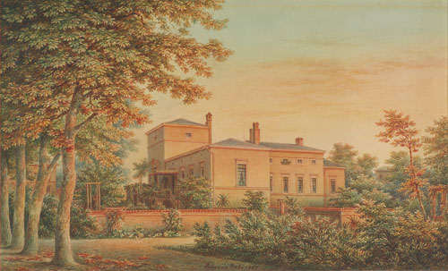 Potsdam, Wohnhaus am Parkeingang Charlottenhof, Architekt: Ludwig Ferdinand Hesse 1846 (Umbau). Aquarell. 28,2 x 45,5 cm, artsales